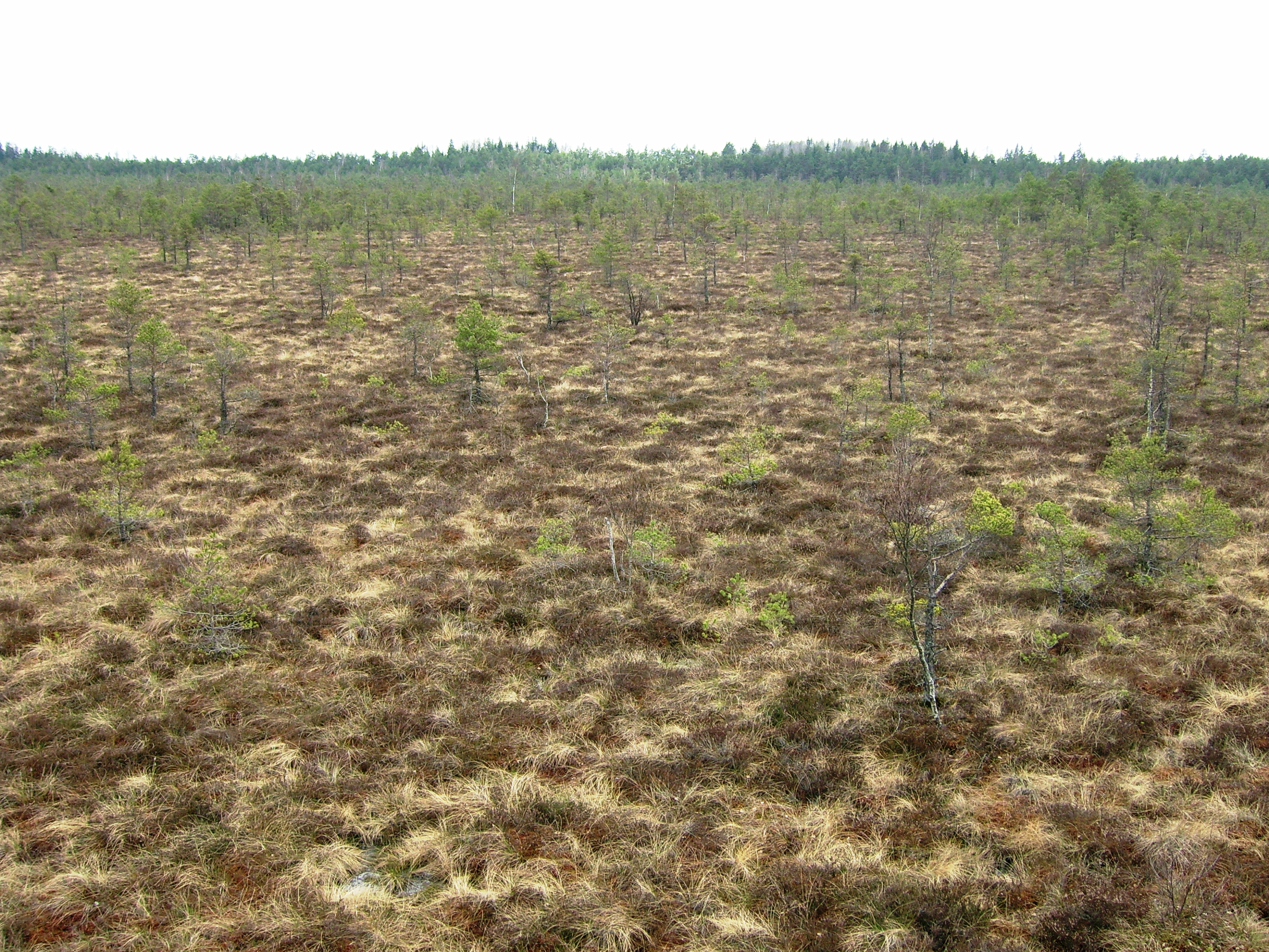 pelkė Plynoji